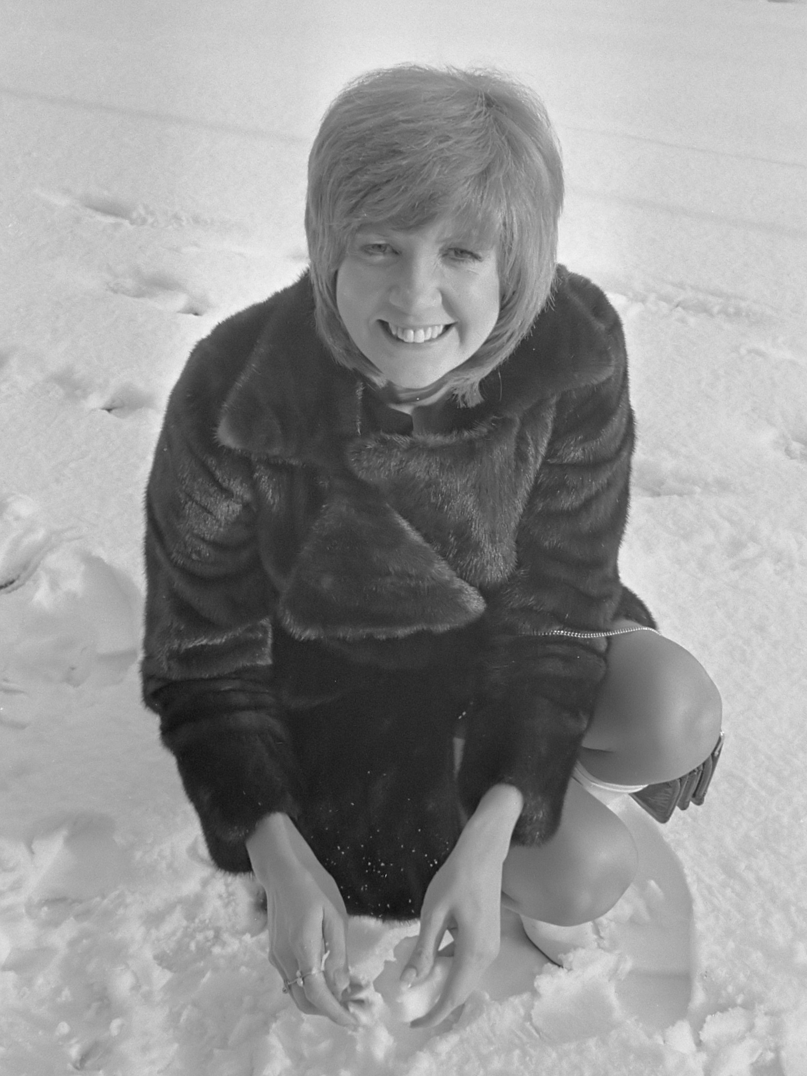 Engelse zangeres Cilla Black hield persconferentie in Apollo hotel Amsterdam. Cilla Black 16 februari 1970